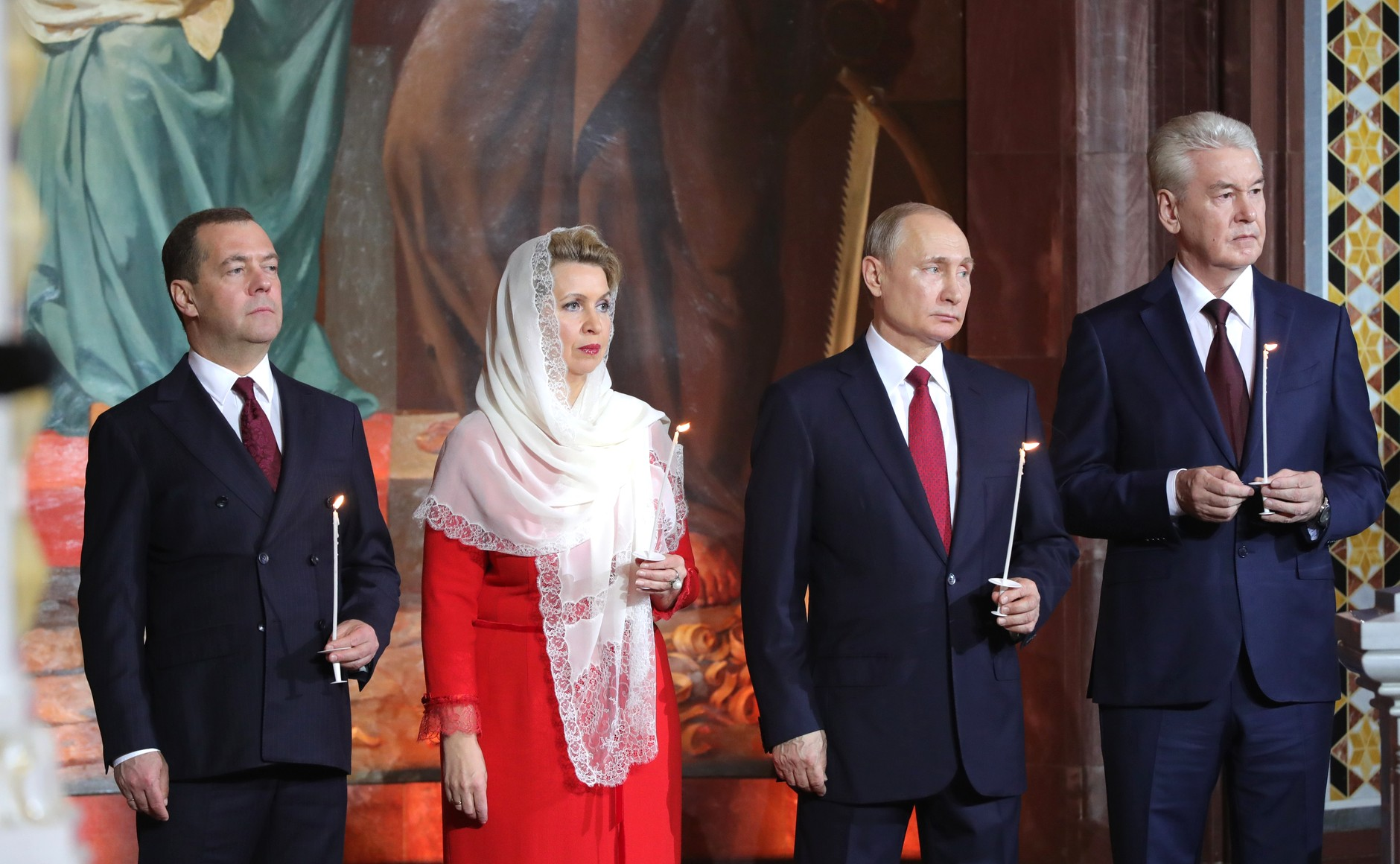 На пасхальном богослужении в храме Христа Спасителя.